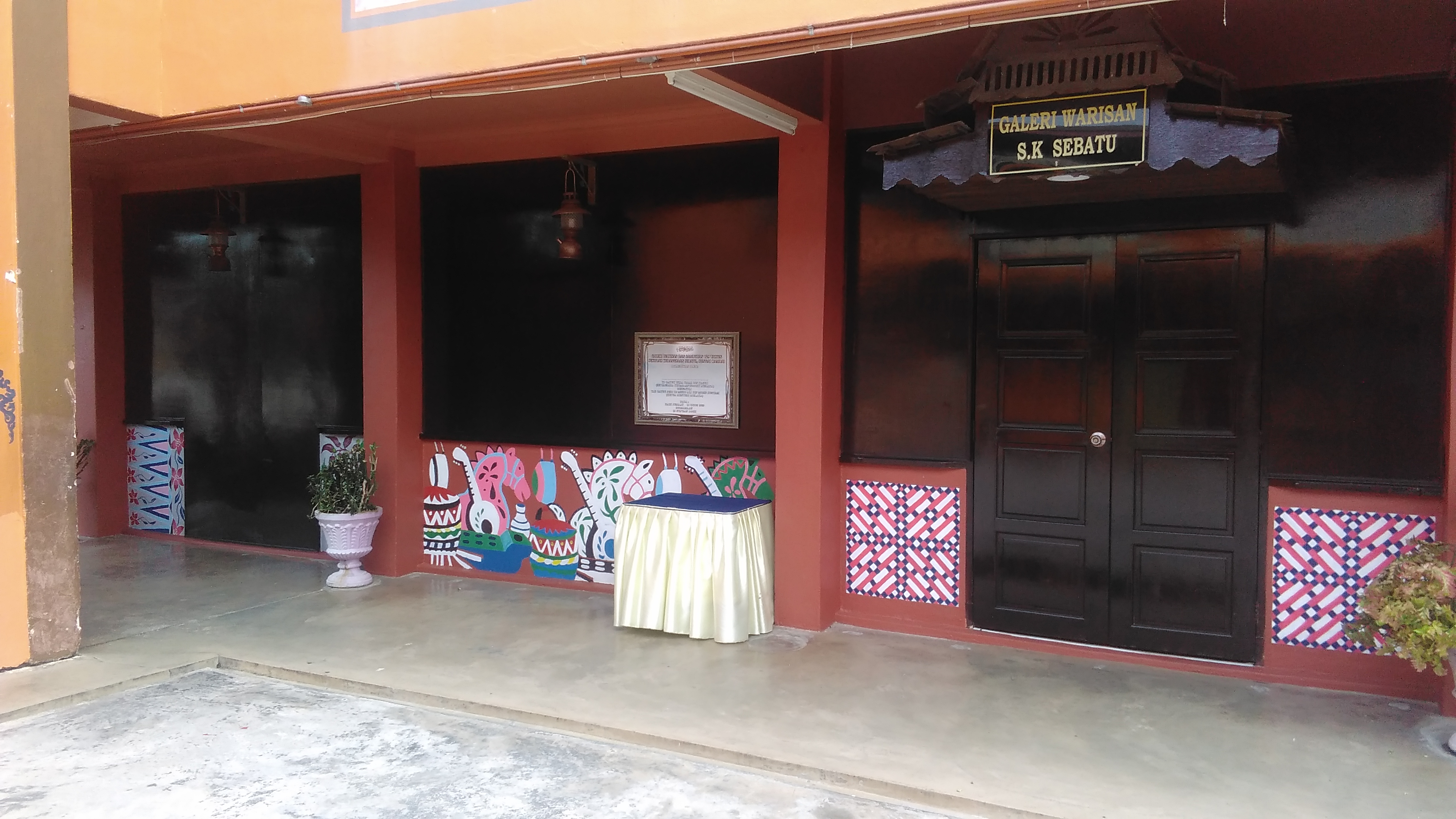 Pandangan Luar 3